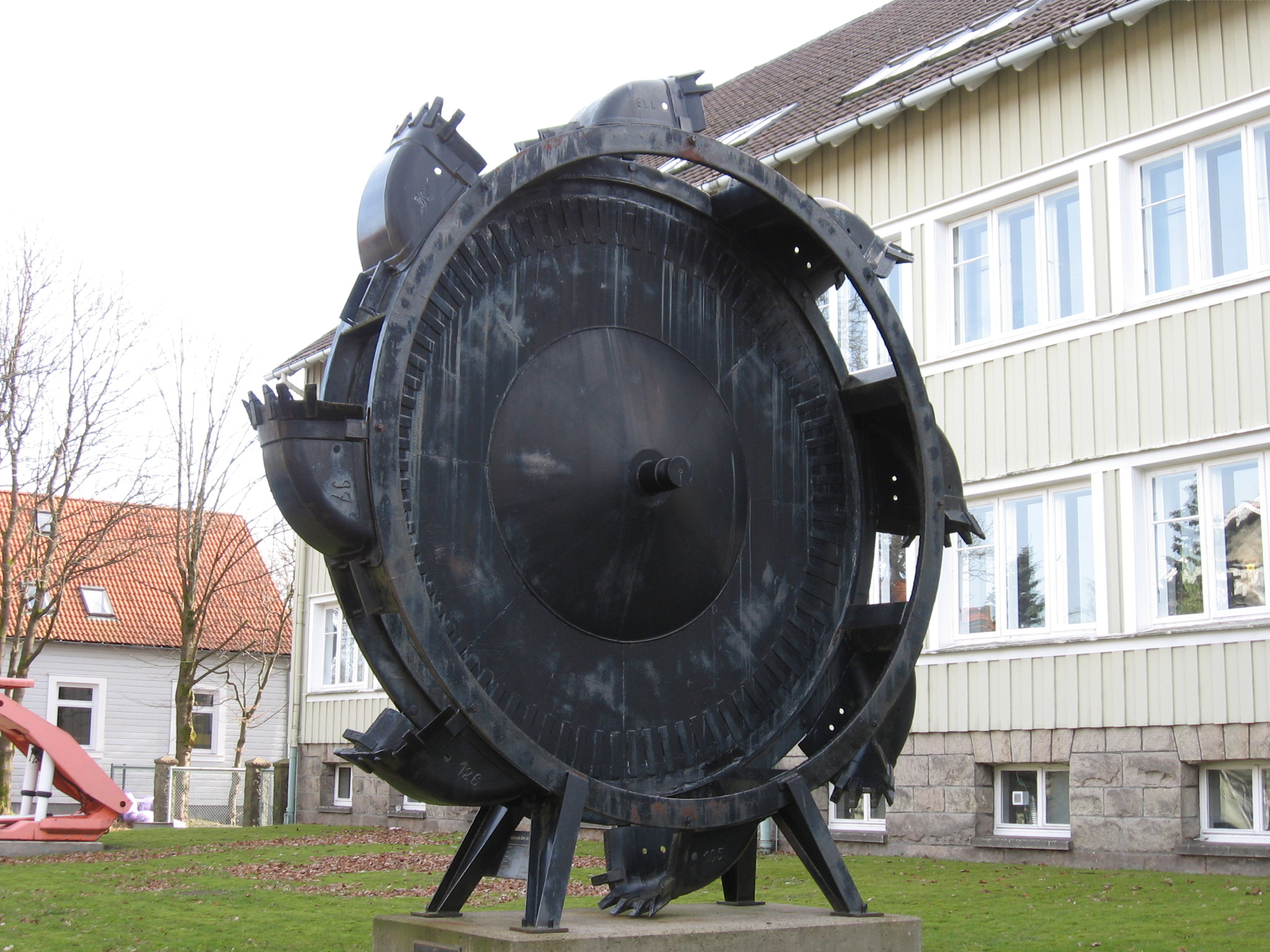 Schaufelrad eines Schaufelradbaggers der von 1955 bis 1993 in den Braunkohletagebauen Helmstedt und Treue der Braunschweigischen Kohlen-Bergwerke AG eingesetzt war. (Ausstellungsstück am Institut für Bergbau der TU Clausthal)